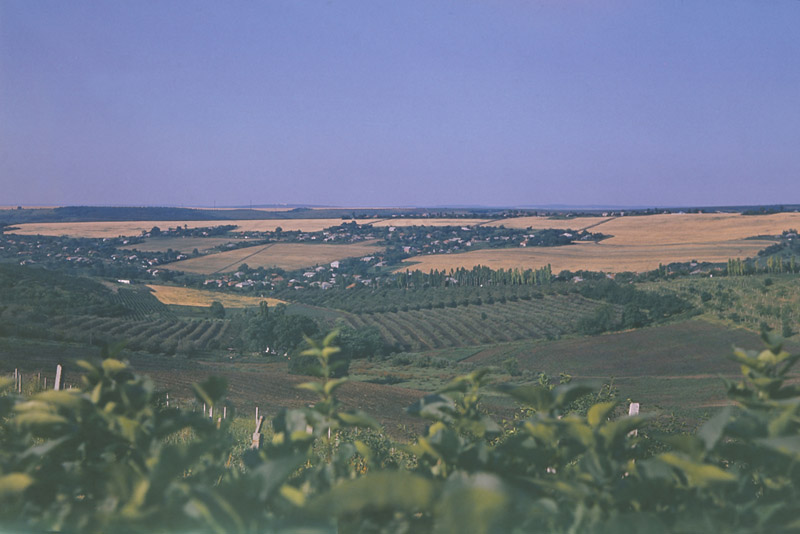 Chisinau.